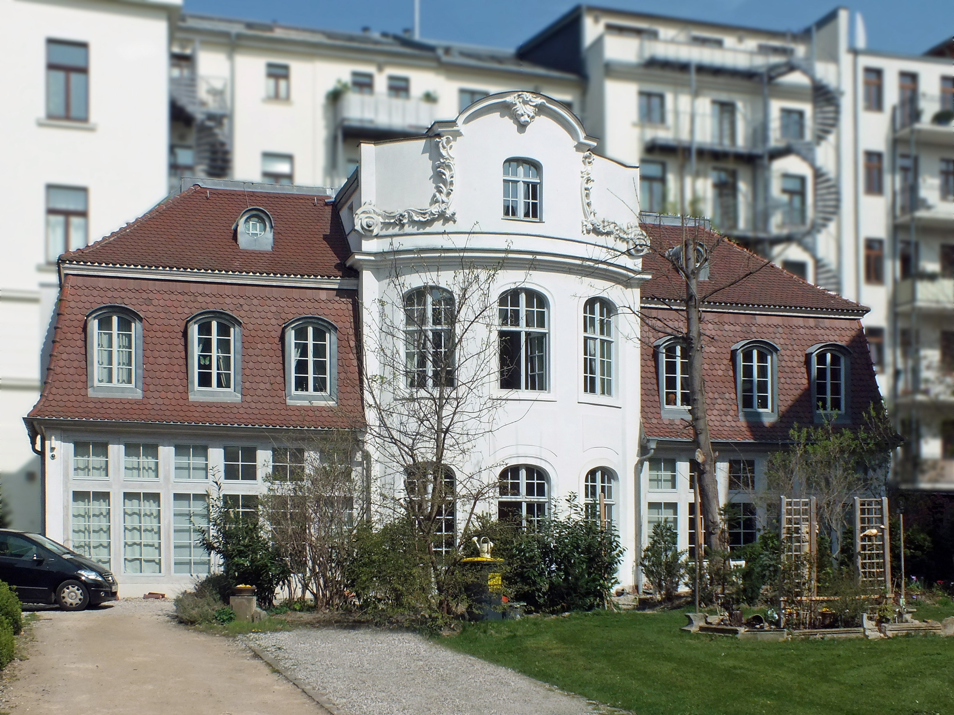 Das rekonstruierte Lincksche Gartenhaus von 1757 in der Seeburgstraße 45 in Leipzig